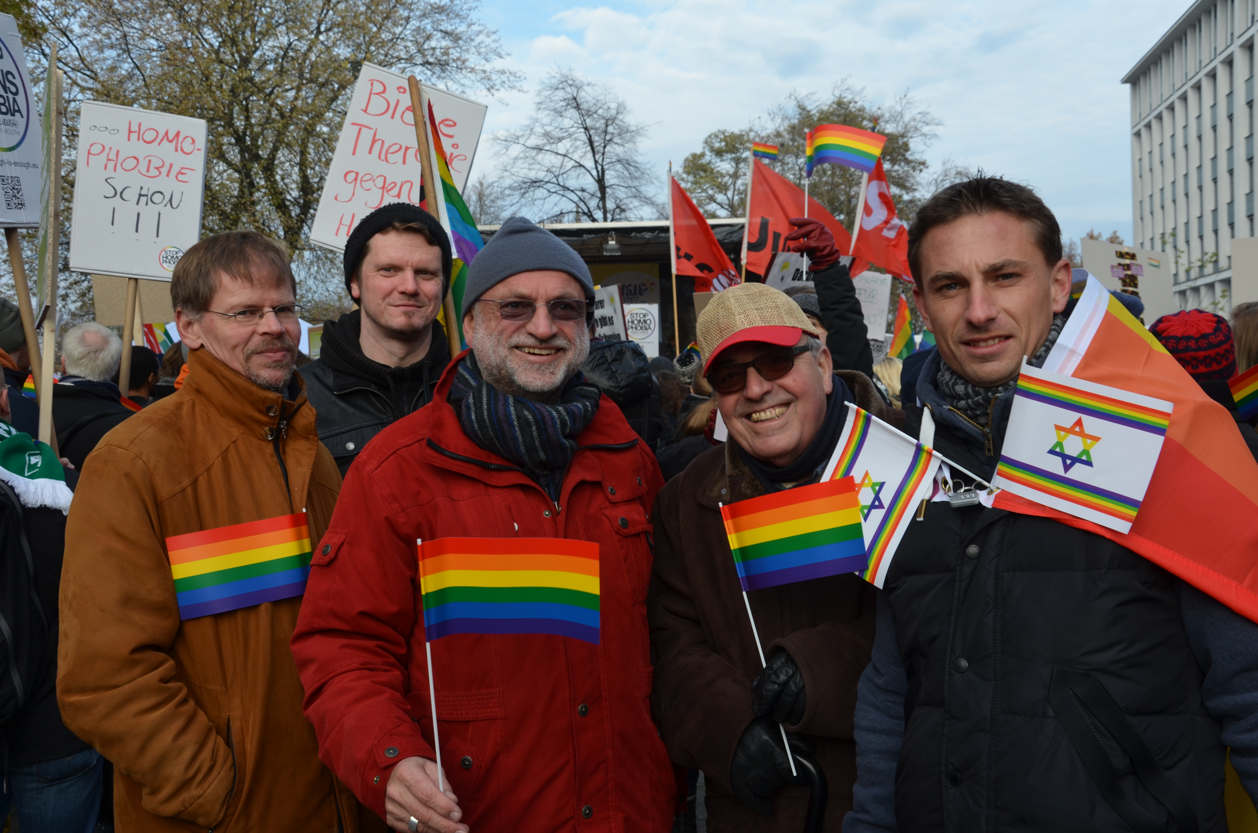 Zu der Kundgebung unter dem Motto Vielfalt statt Einfalt, zu der sich bundesweit mehr als 40 Organisationen, Gruppen und Einzelpersonen zusammengefunden haben, fand am 22. November 2014 auf dem Platz der Goseriede in Hannover eine bunte Kundgebung statt. Mehrere hundert Menschen hatten sich zusammengefunden mit dem Ziel, das Schwule, Lesben, Trans- und Intersexuelle Menschen zukünftig keine Ausgrenzung mehr erfahren, sondern in ihrer freien Persönlichkeitsentwicklung schon durch den Schulunterricht frühzeitig gefördert werden. Bereits am Vortag der Kundgebung hatte die Stadt Hannover den nahegelegenen Platz Am Steintor, auf dem am selben Tag eine weitere, sogenannte Demo für alle startete, zahlreiche Regenbogenfahnen hochgezogen als für alle sichtbares Zeichen der Bereicherungen des gemeinschaftlichen Zusammenlebens und -arbeitens vielfältiger Identitäten und Kulturen in der niedersächsischen Landeshauptstadt ...